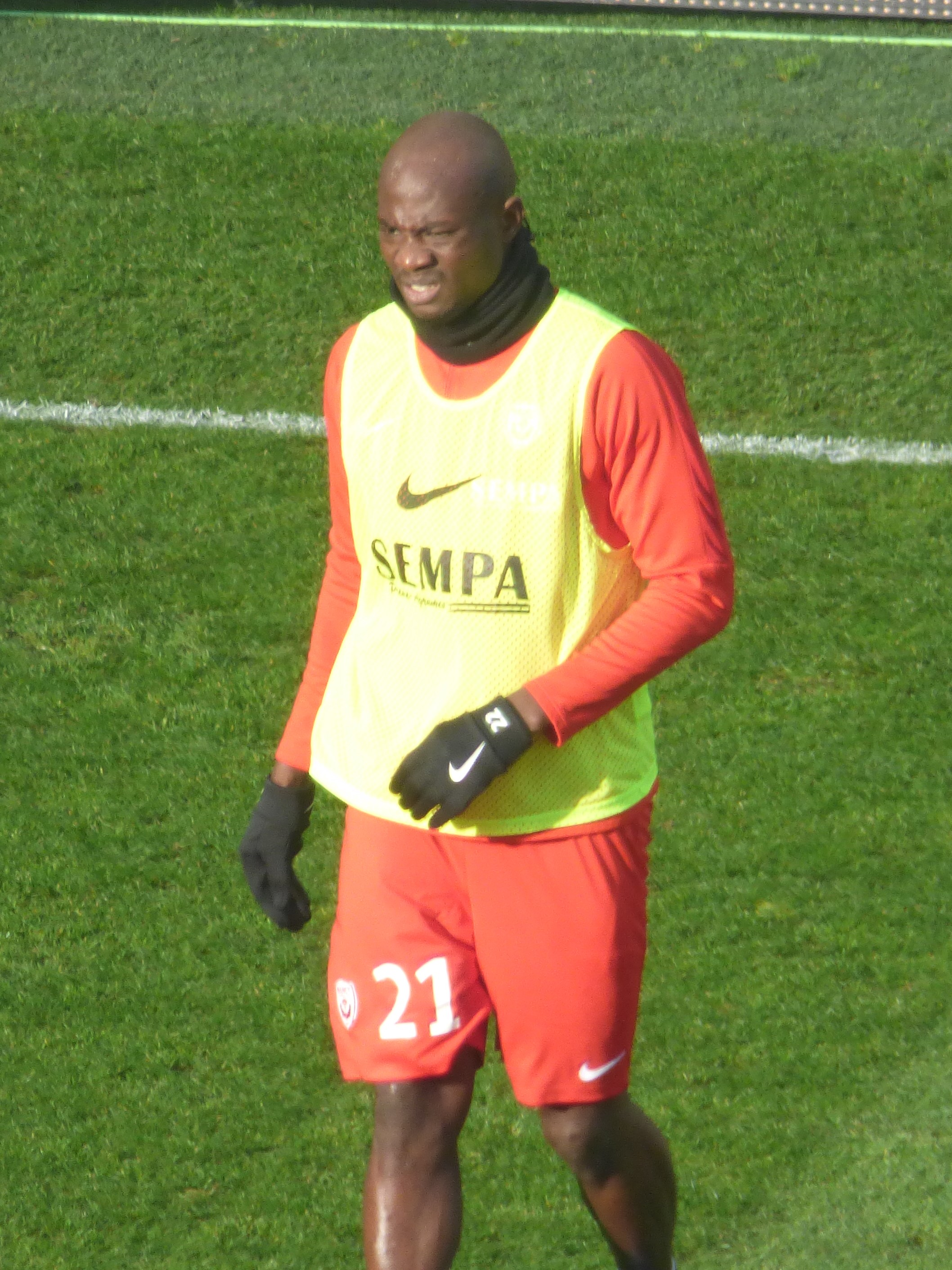 Sega Coulibaly avant le match RC Lens / AS Nancy-Lorraine, comptant pour la vingt-et-unième journée du championnat de France de football de Ligue 2 2018-2019, le 19 janvier 2019, au Stade Bollaert-Delelis de Lens.